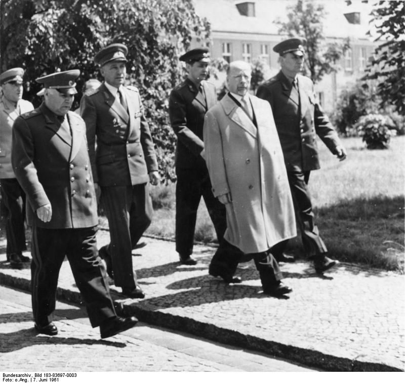 Zentralbild / MBD / 7.6.1961 Der Erste Sekretär des ZK der SED und Vorsitzender des Staatsrates der Deutschen Demokratischen Republik, Walter Ulbricht gemeinsam mit Teilnehmern der Zusammenkunft aus Anlaß der gemeinsamen Sommerübungen der Gruppe der sowjetischen Streitkräfte in Deutschland und der Nationalen Volksarmee der Deutschen Demokratischen Republik. UBz: vlnr: Marschall [Rodion J.] Malinowski, Armeegeneral Heinz Hoffmann und Walter Ulbricht.